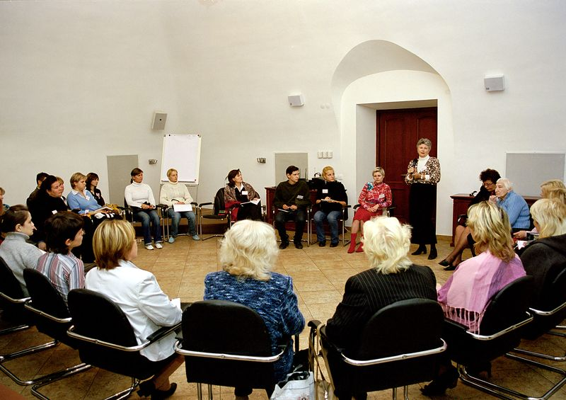 Сеанс групової психотерапії